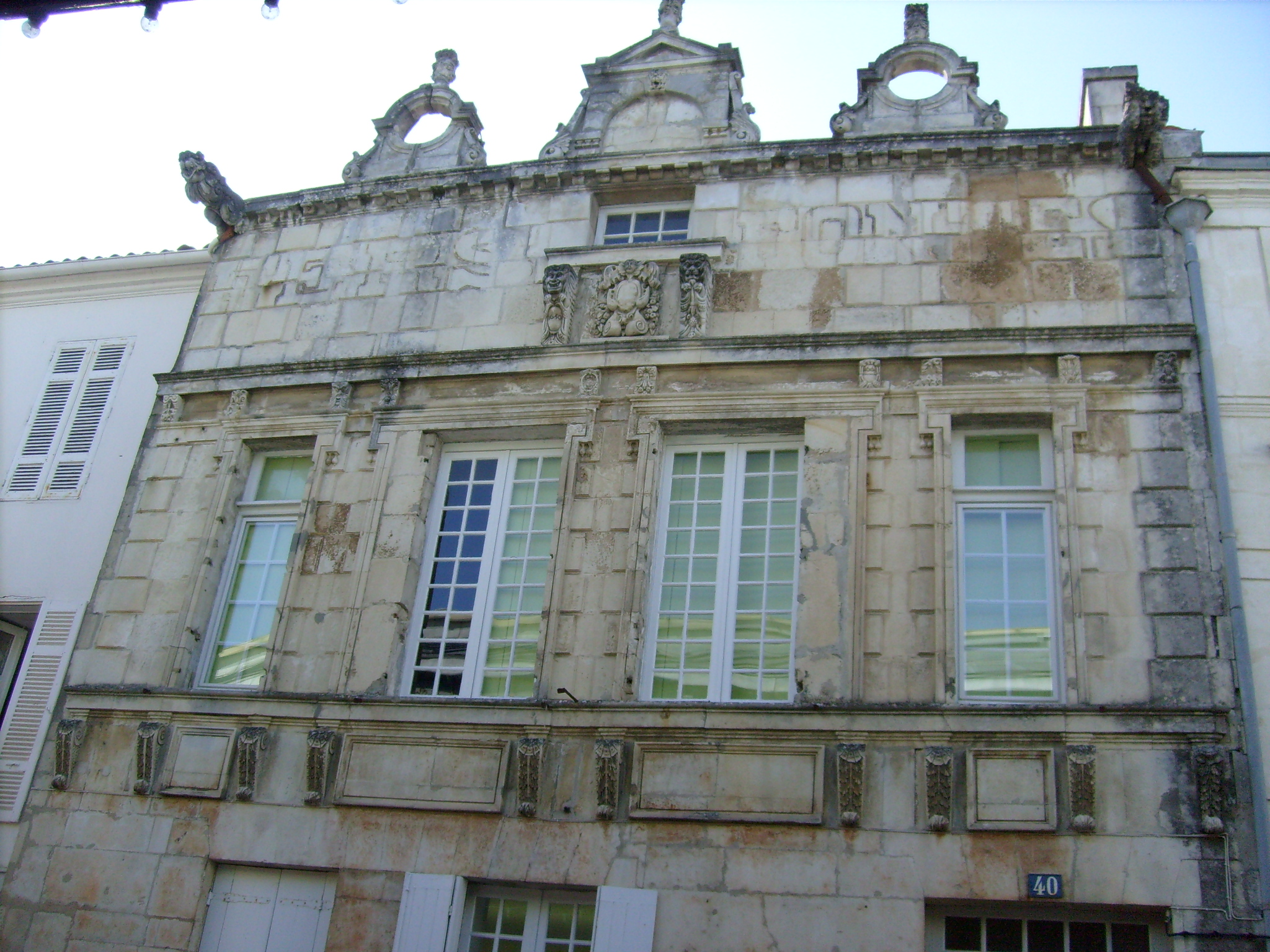 Maison de Richelieu à Marennes